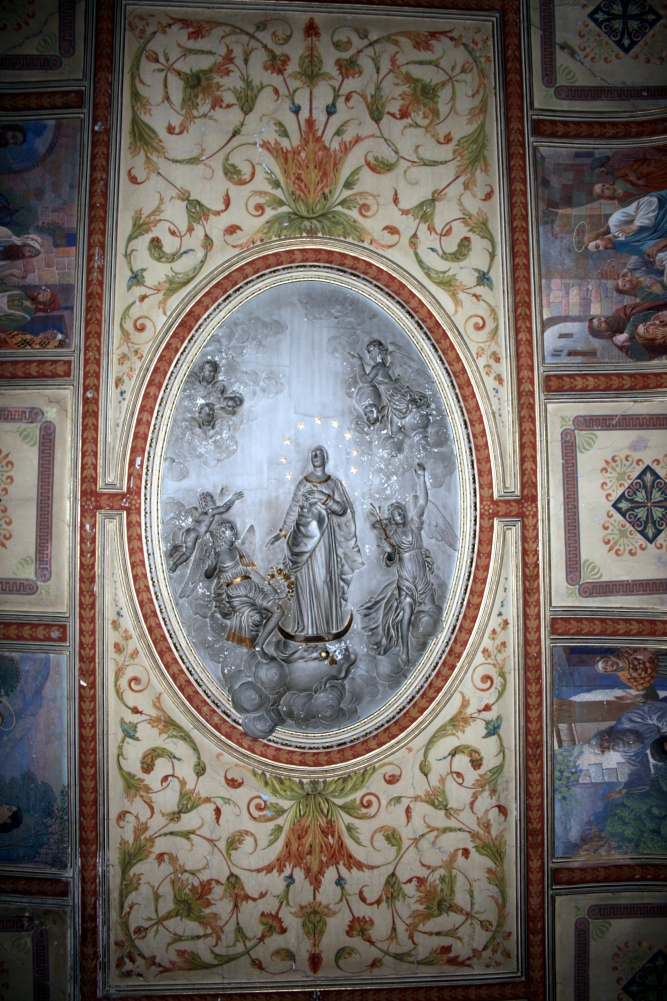 svod stolne crkve Svetog Filipa i Jakova u Novom Vinodolskom, Hrvatska